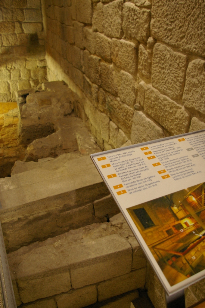 "Casa do Infante" museum in Porto, Portugal